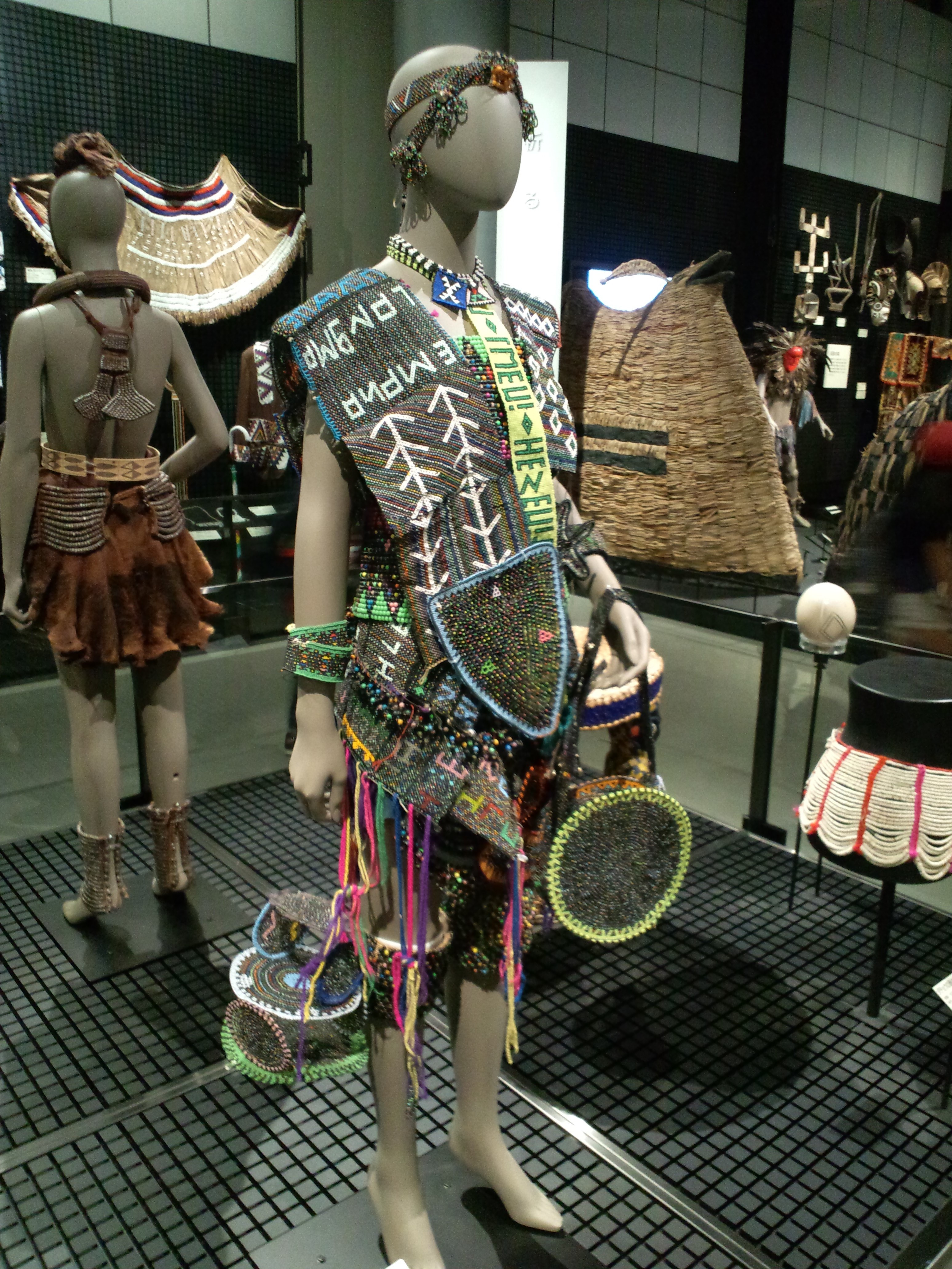 国立民族学博物館（大阪） ビーズ製の花嫁衣裳（南アフリカ、ズールー族、1996年収集）